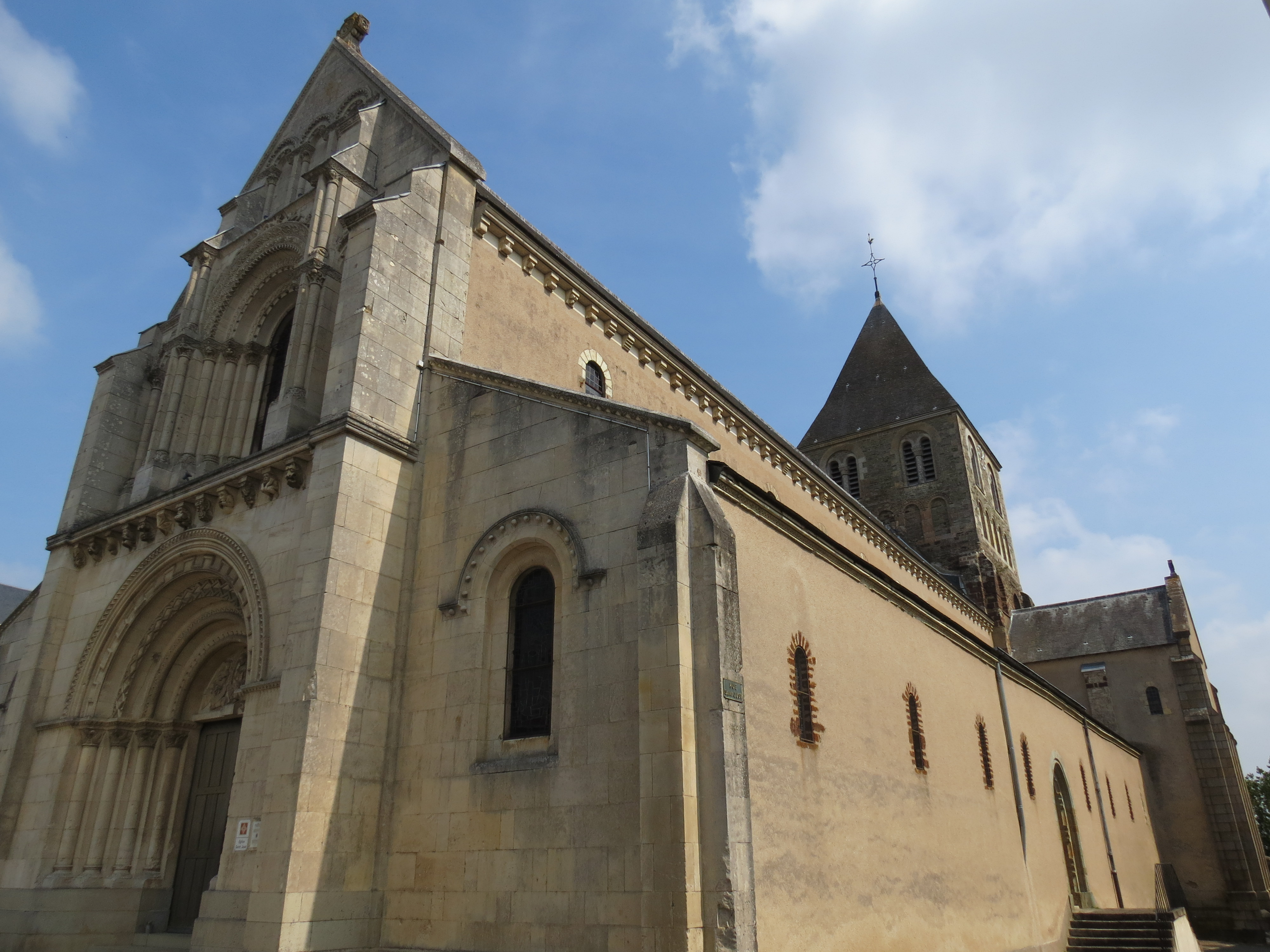 Église Saint-Jean-Baptiste de Château-Gontier, Mayenne.